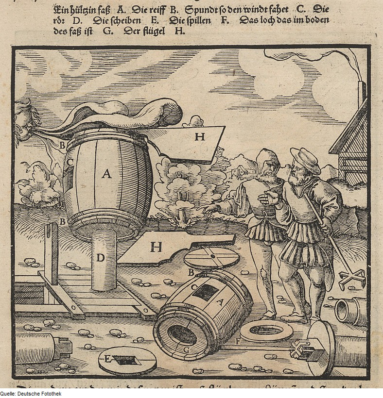 Original image description from the Deutsche Fotothek Bergwerk & Bergbau & Grubenbewetterung & Bewetterung & Wetterführung & Windfang & Fass & Windflügel & Spille